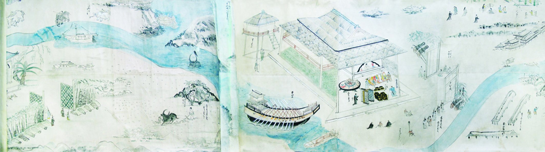 Họa phẩm Giao Chỉ quốc mậu dịch độ hải đồ (交趾国渡航図巻) của Chaya Shinroku (茶屋新六)